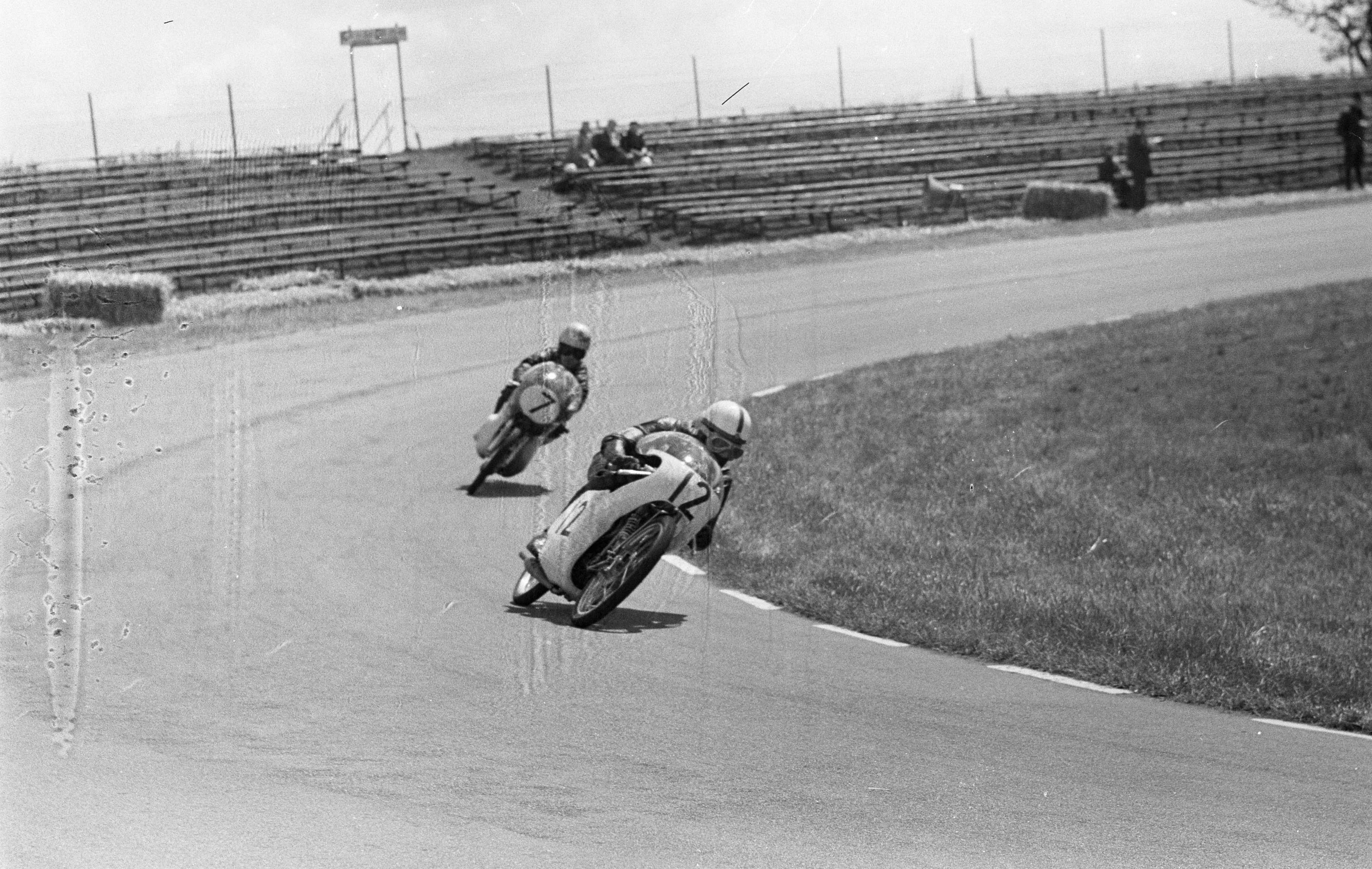 Collectie / Archief : Fotocollectie Anefo Reportage / Serie : TT Assen 1962 Beschrijving : Training TT-races op circuit Assen , Jan Tennis Huberts en T. Robb Datum : 28 juni 1962 Locatie : Assen Trefwoorden : motorsport Instellingsnaam : TT Fotograaf : Bilsen, Joop van / Anefo Auteursrechthebbende : Nationaal Archief Materiaalsoort : Negatief (zwart/wit) Nummer archiefinventaris : bekijk toegang 2.24.01.05 Bestanddeelnummer : 914-0761